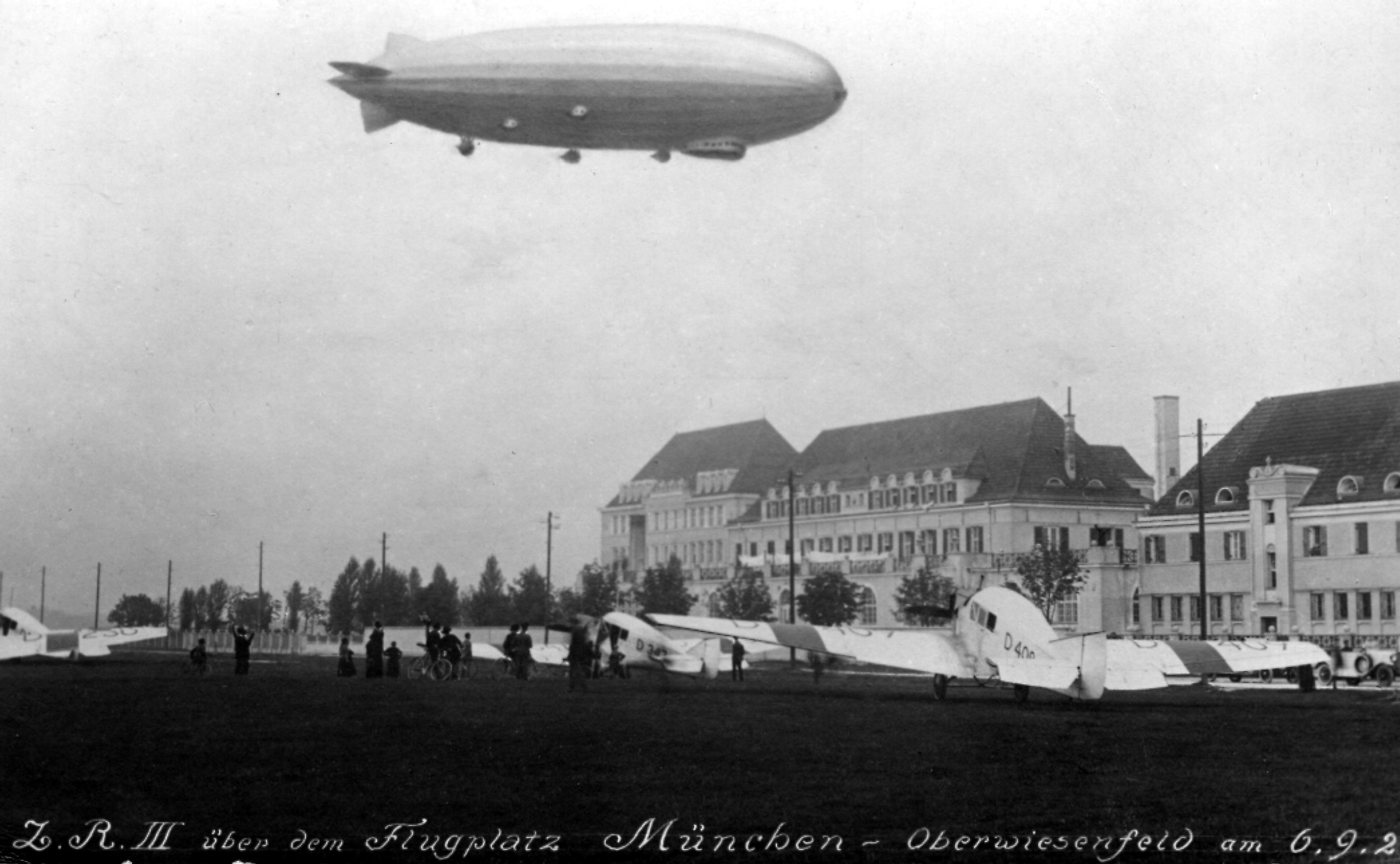 Suedbremse AG in Munich